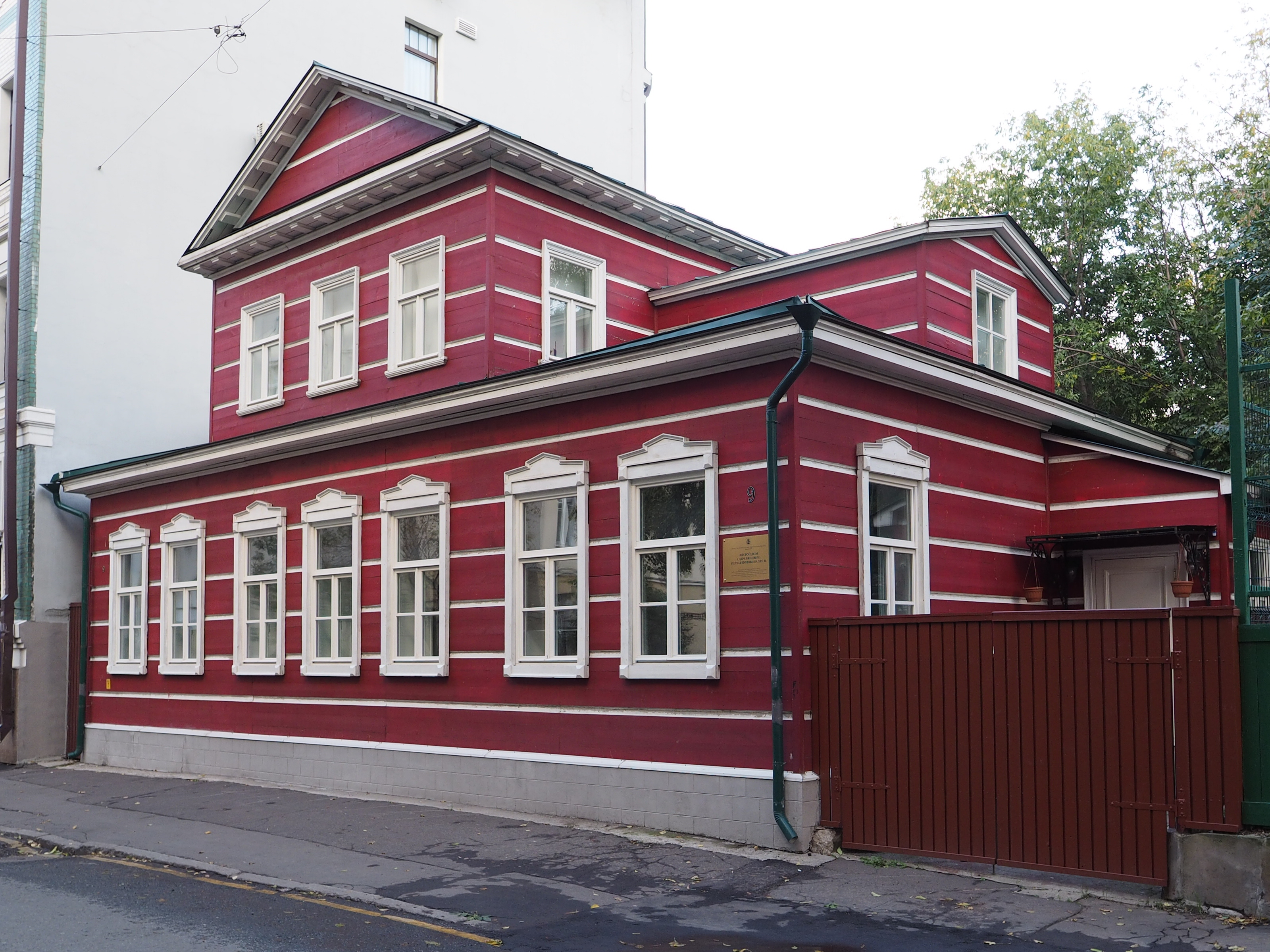 Жилой дом (деревянный): Голиковский пер., дом 9, Замоскворечье, Центральный округ, Москва